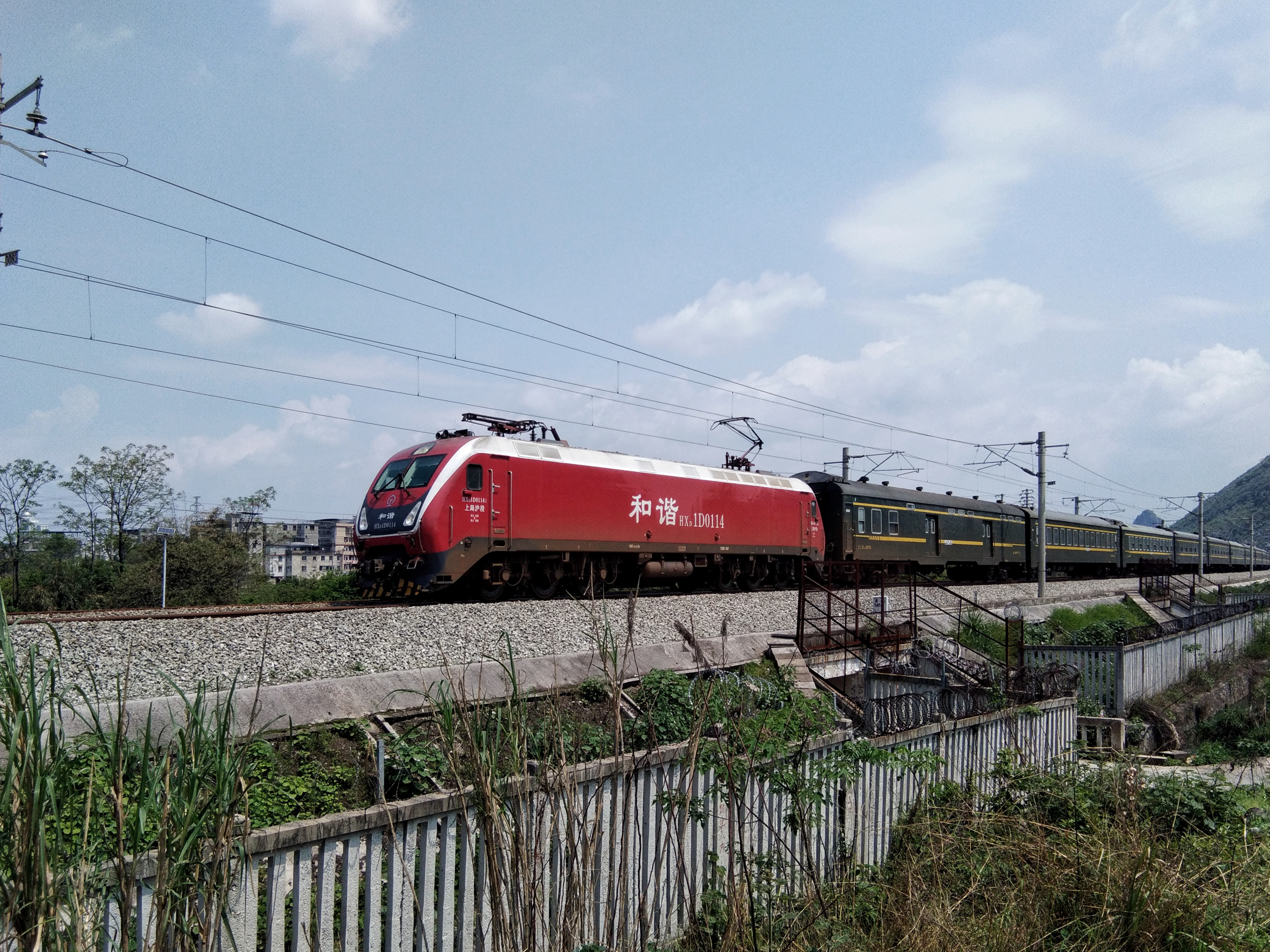 T381次列车通过桂林市官桥村